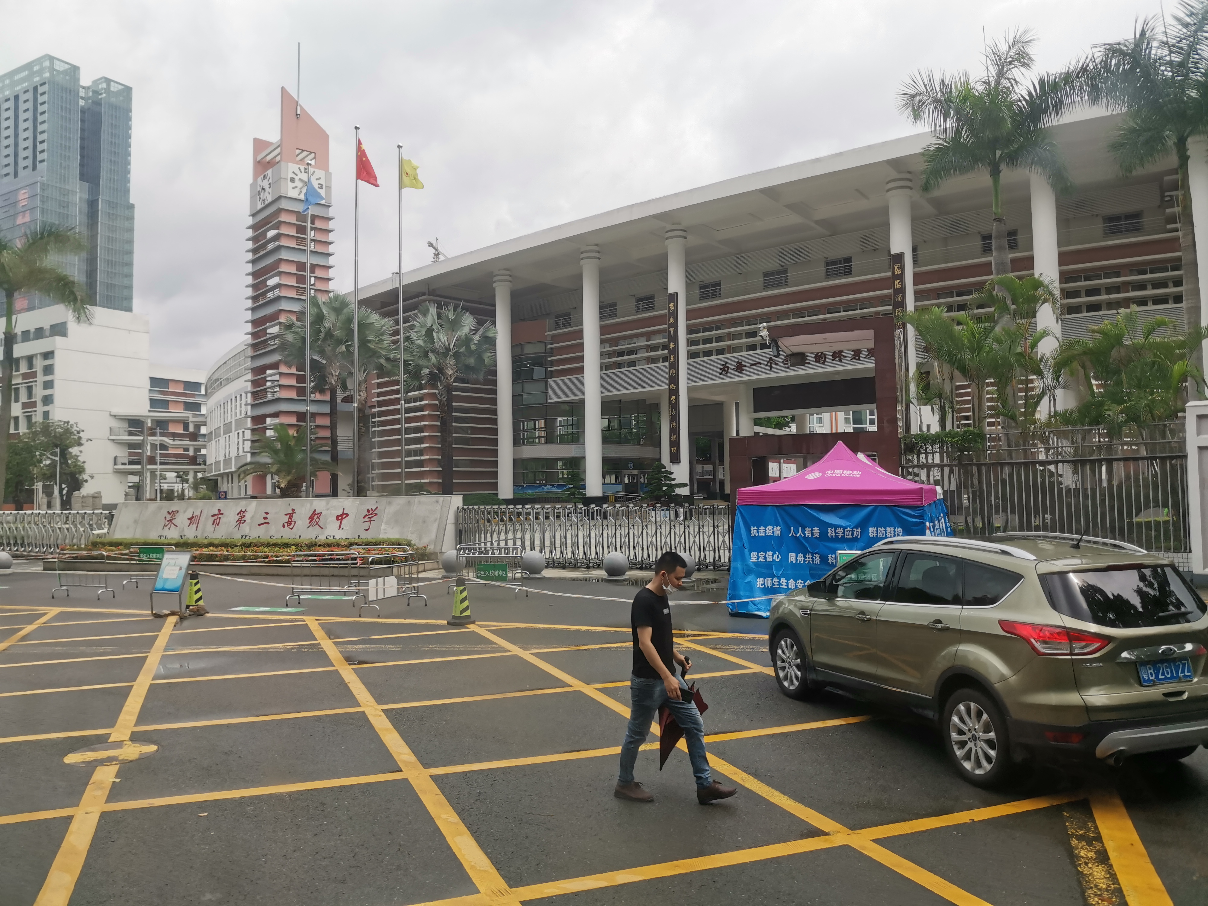 深圳第三高级中学高中部